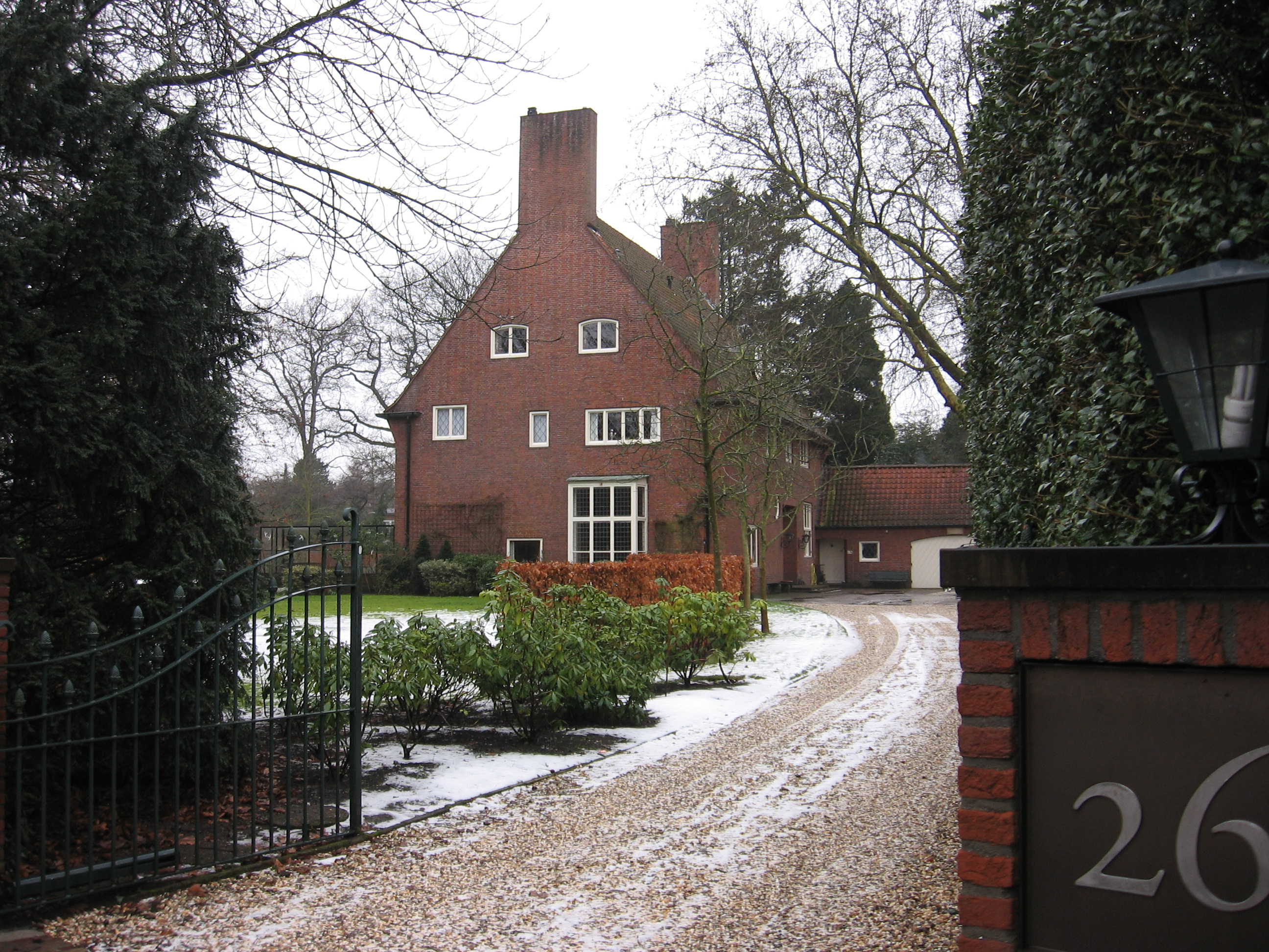 Nieuwe 's-Gravelandseweg 26 , Bussum